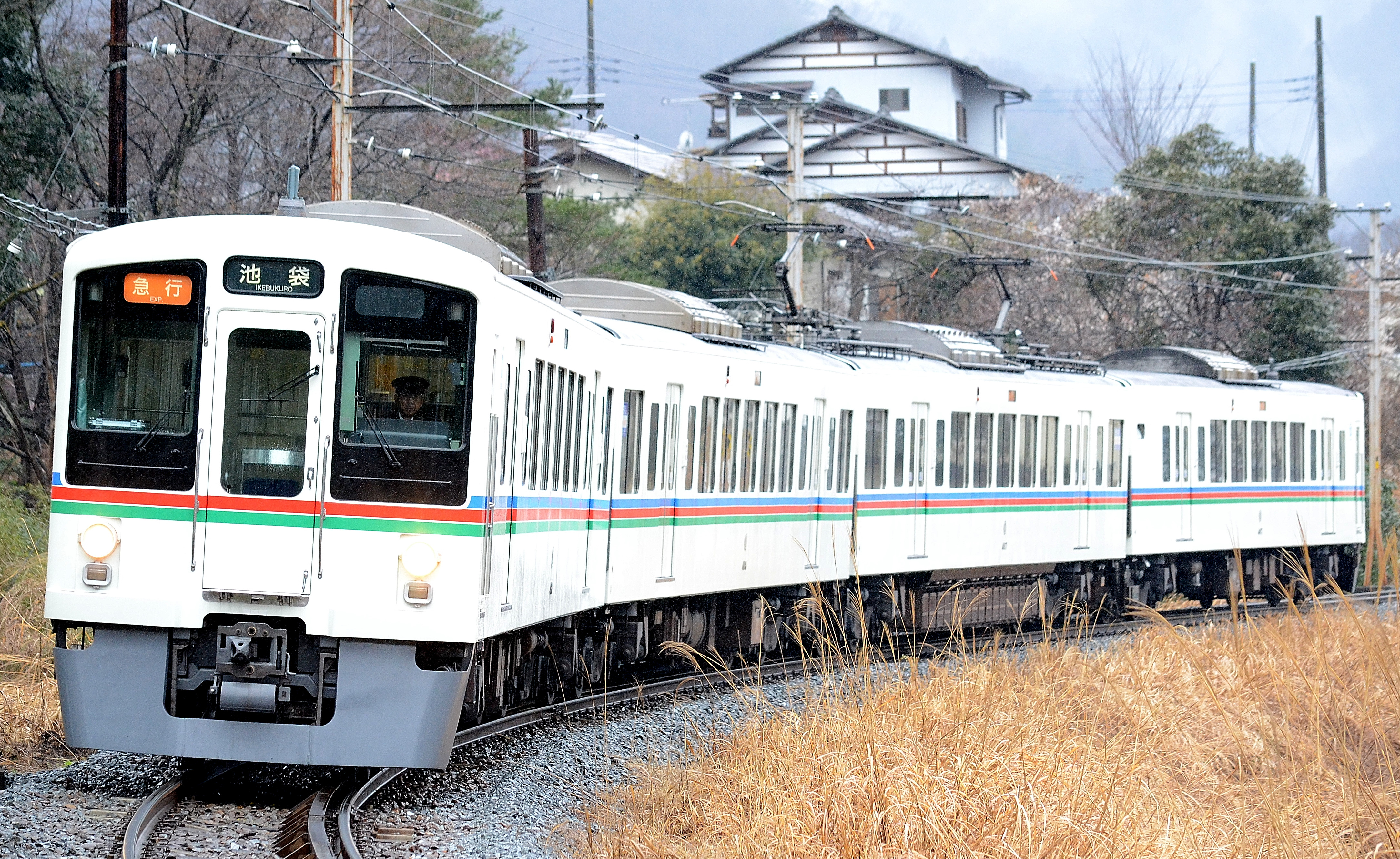 秩父鉄道線を走行する西武4000系